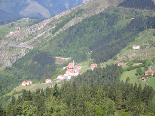 Gipuzkoako Beizama udalerria. Euskal Herria.